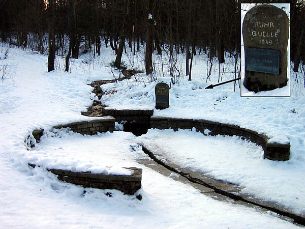 Ruhrquelle bei Winterberg (selbst photographiert, GNU-FDL)